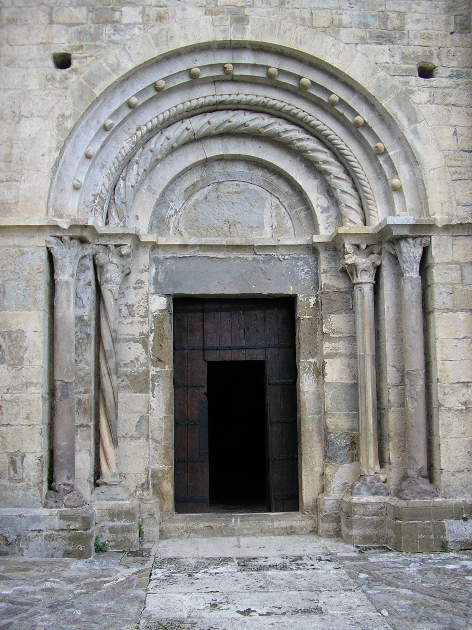 Beget - Iglesia de Sant Cristòfol (Portada)